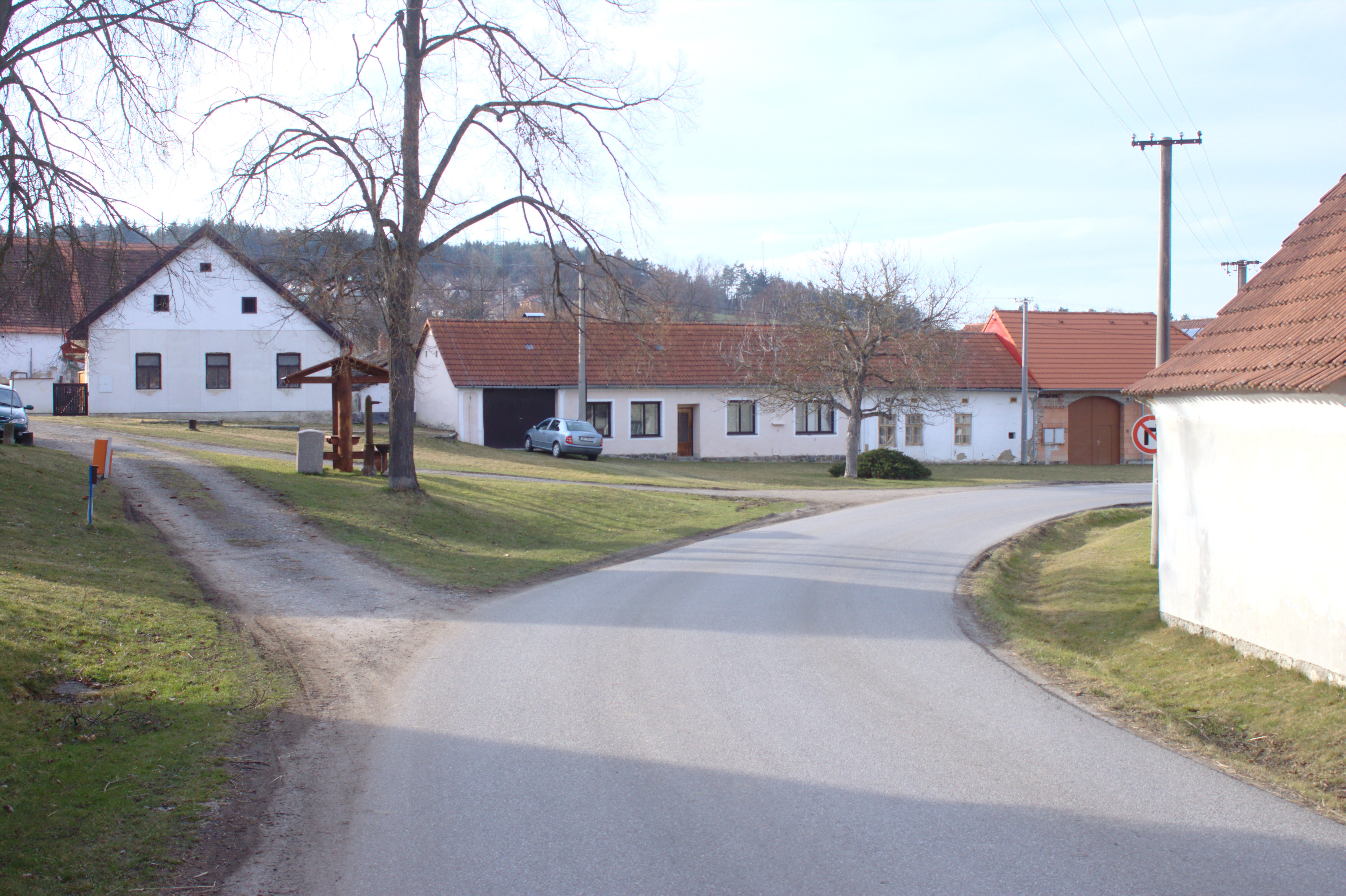 Náves ve vesnici Závraty Project: Fotíme Česko